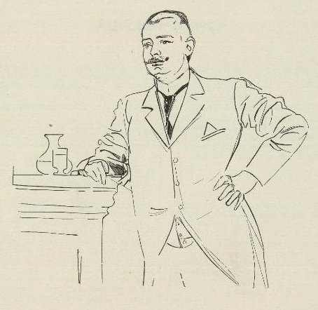 Den norske juristen og politikeren Ludvig Meyer.